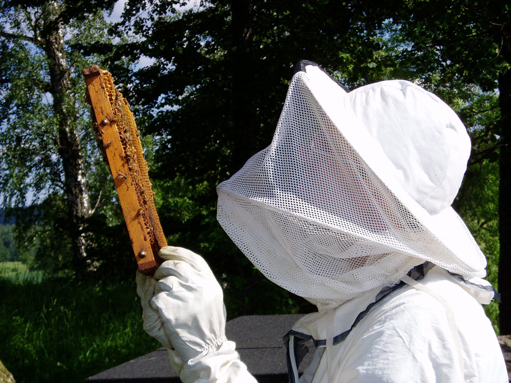 Beekeeping.